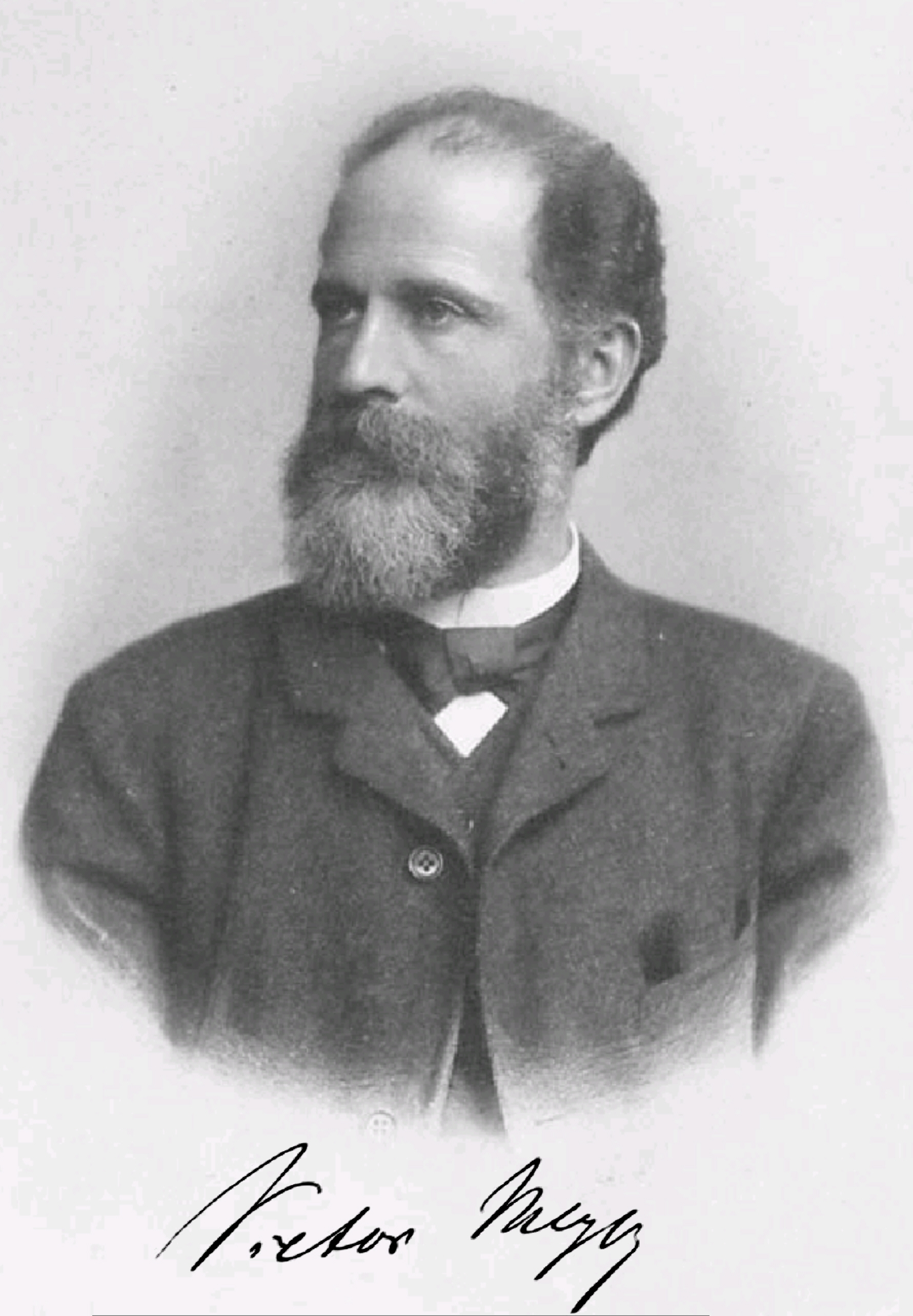 Scan eines Portraits von Victor Meyer (* 8. September 1848 in Berlin; † 8. August 1897 in Heidelberg)